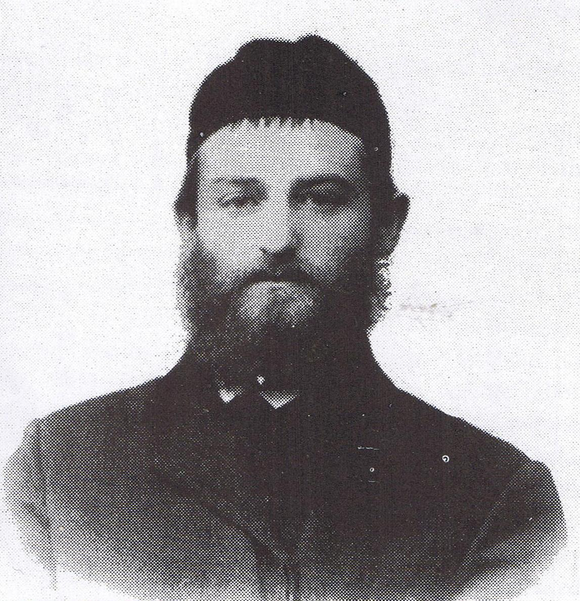 Rabin Szydłowca w pierwszych dekadach XX. wieku - Rubin Rabinowicz